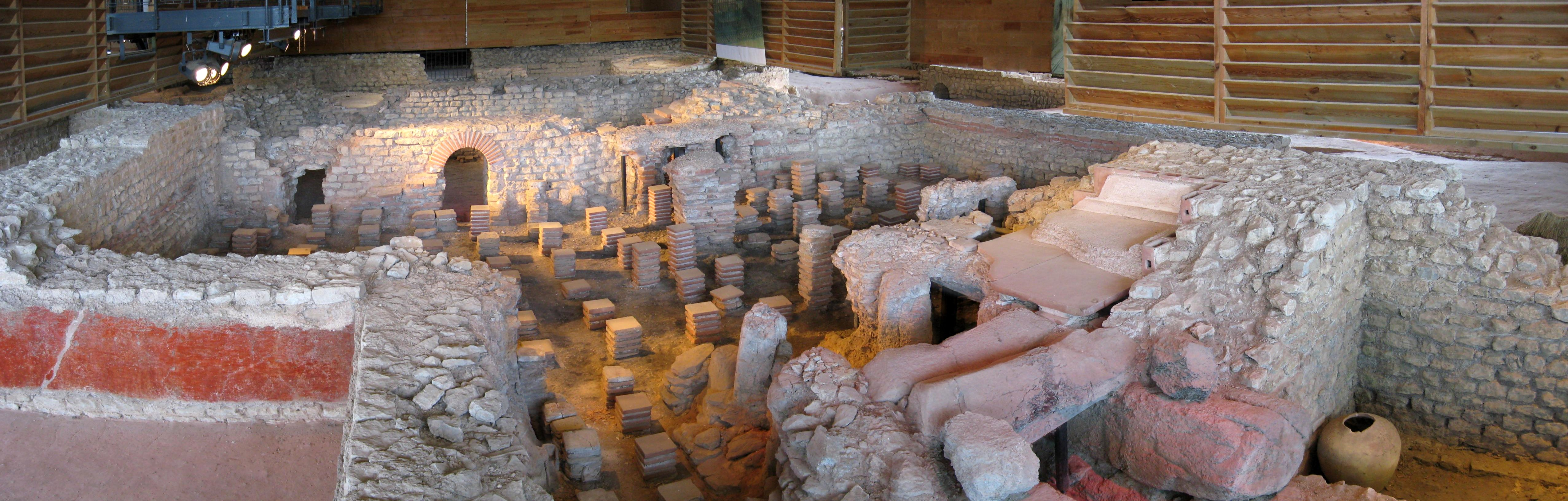 Fundamente und Hypocaustum in Bliesbruck